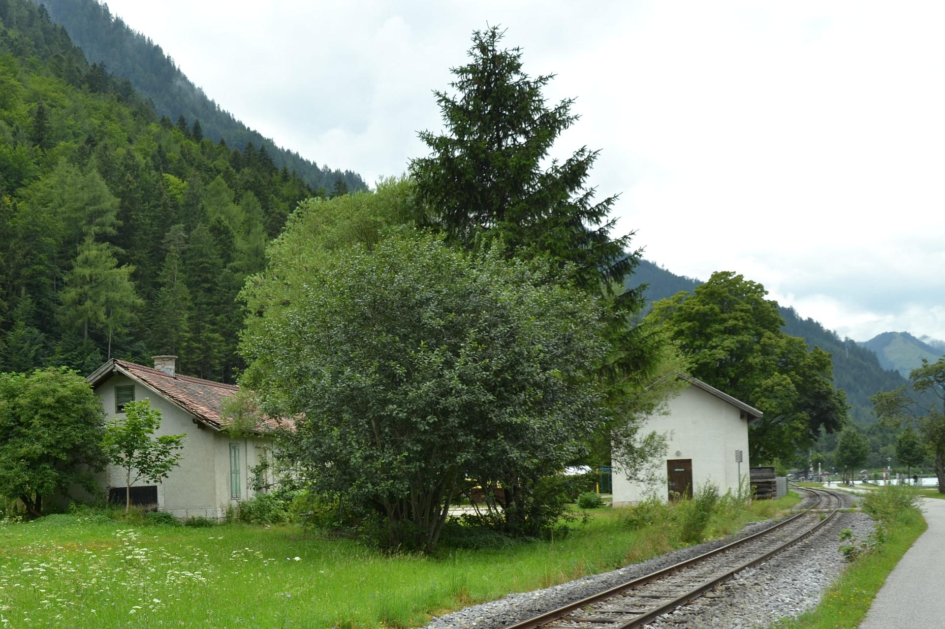 Gebäude des ehemaligen alten Bahnhofs am Seespitz; nach der Verlängerung der Strecke zum Schiffsanleger am Achensee wurde der Bahnhof aufgelassen